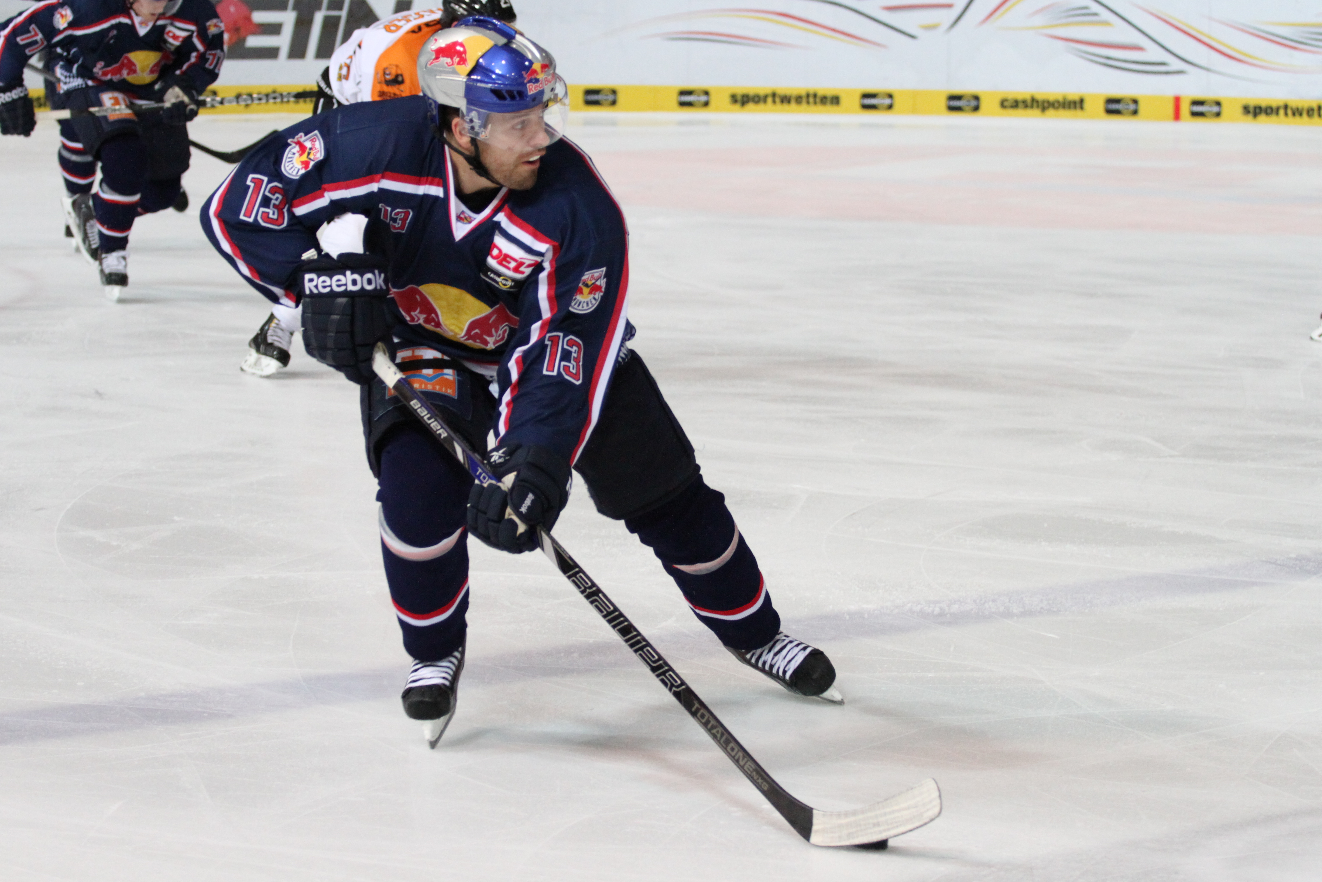 Daniel Sparre am Puck.